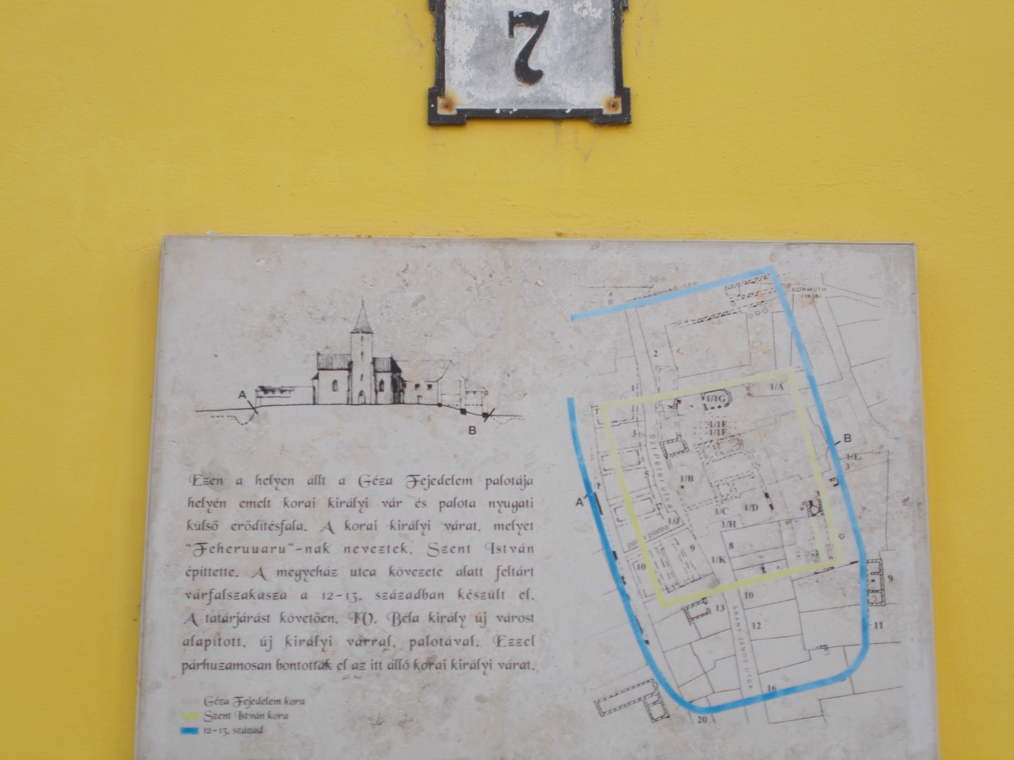 Tábla Géza fejedelem egykori palotájának rajzával. Barokk műemlék lakóház. ID 3862. - Magyarország, Fejér megye, Székesfehérvár, Belváros, Megyeház utca, 7 This is a photo of a monument in Hungary. Identifier: 3862